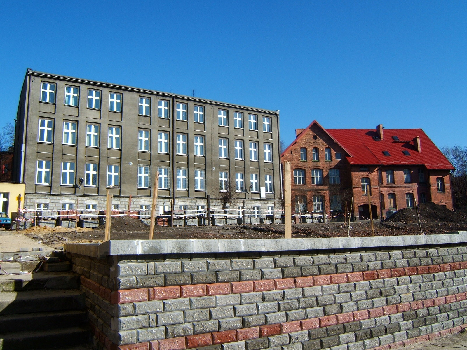 Bykowina - budynki szkolne z lat 1905 i 1914